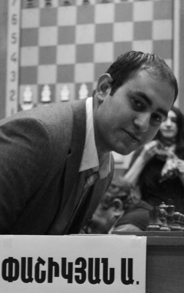 Արման Փաշիկյան